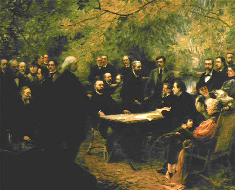 Les poètes du Parnasse Tableau de Paul Chabas, « Chez Alphonse Lemerre, à Ville d’Avray », Salon de 1895 Le jardin de l’ancienne propriété du père de Camille Corot, rachetée par l’éditeur parisien Alphonse Lemerre, sert ici de toile de fond au peintre Paul Chabas pour immortaliser les poètes du Parnasse. Aux côtés de Paul Bourget, on remarque François Coppée, Leconte de Lisle, Marcel Prévost, Auguste Dorchain, Léon Dierx, Henri Cazalis, Alphonse Daudet, Sully-Prudhomme, Jules Breton, Paul Arène, André Theuriet, Jules Claretie, José-Maria de Heredia, Paul Hervieu, Henry Roujon, Georges Lafenestre, Alphonse Lemerre.